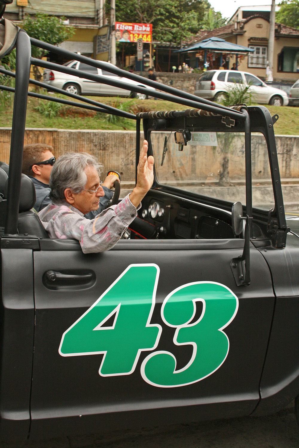 O político brasileiro Fernando Gabeira em sua campanha para a prefeitura do Rio de Janeiro.